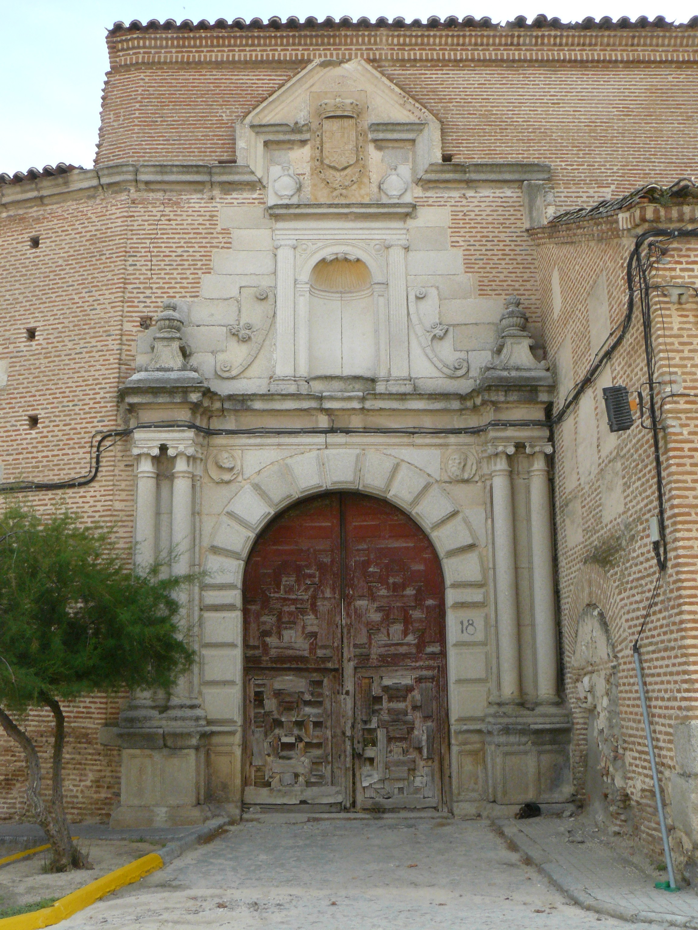 Iglesia de San Nicolás y antiguo colegio de jesuitas, Arévalo, Ávila.